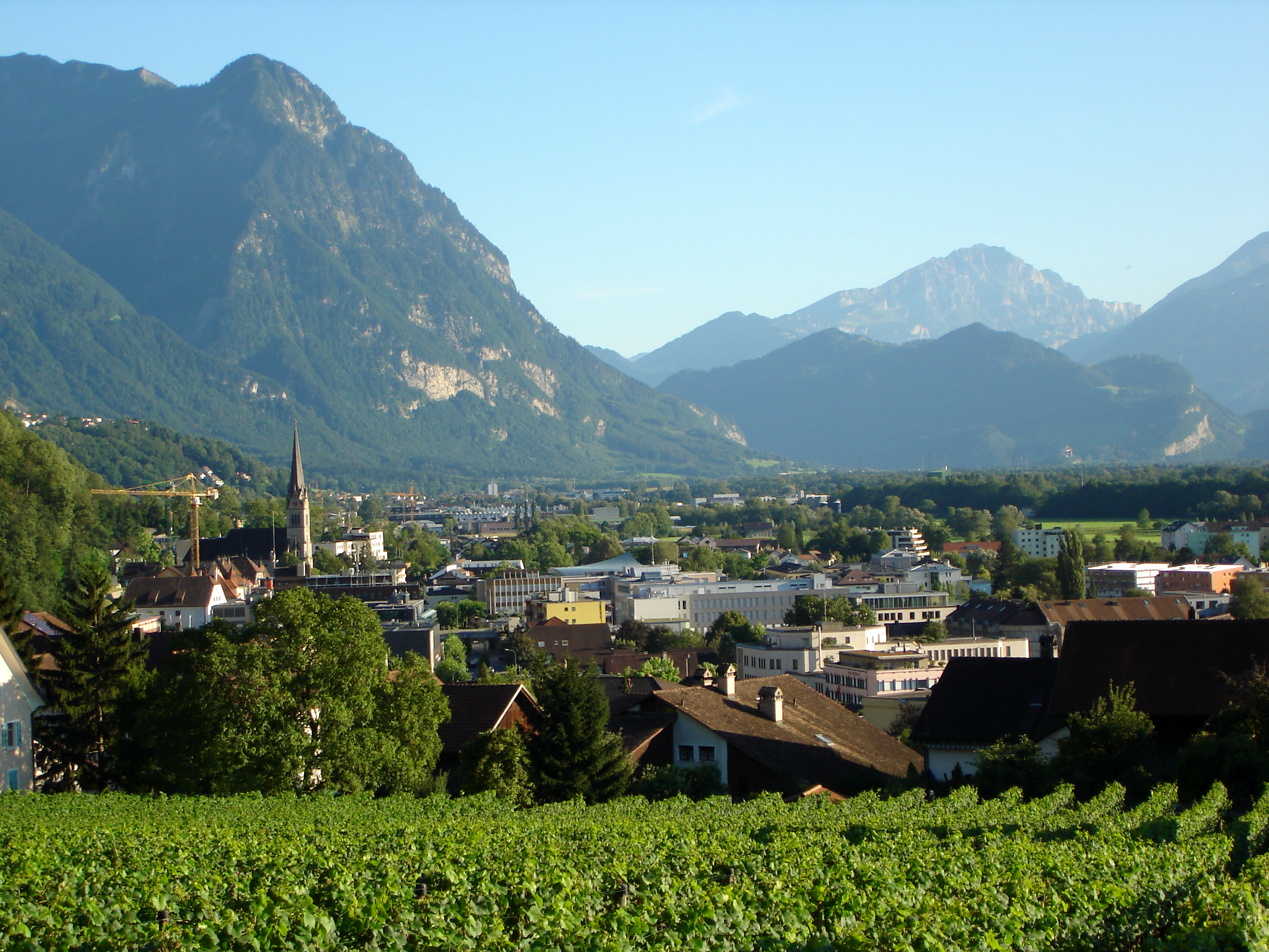 Liechtenstein: Blick auf die Hauptstadt Vaduz